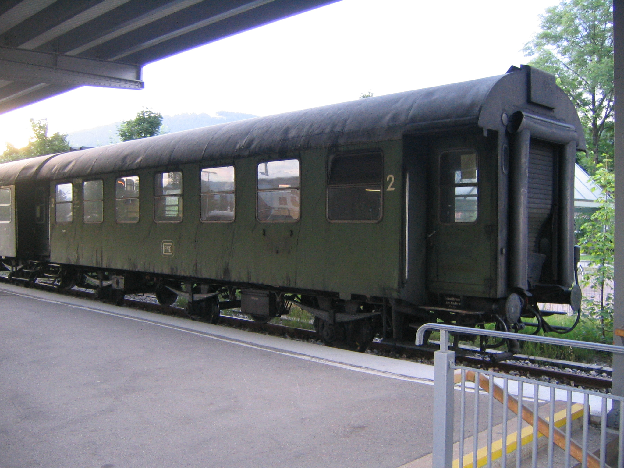 Personenwagon der Fränkischen Museums-Eisenbahn in Titisee